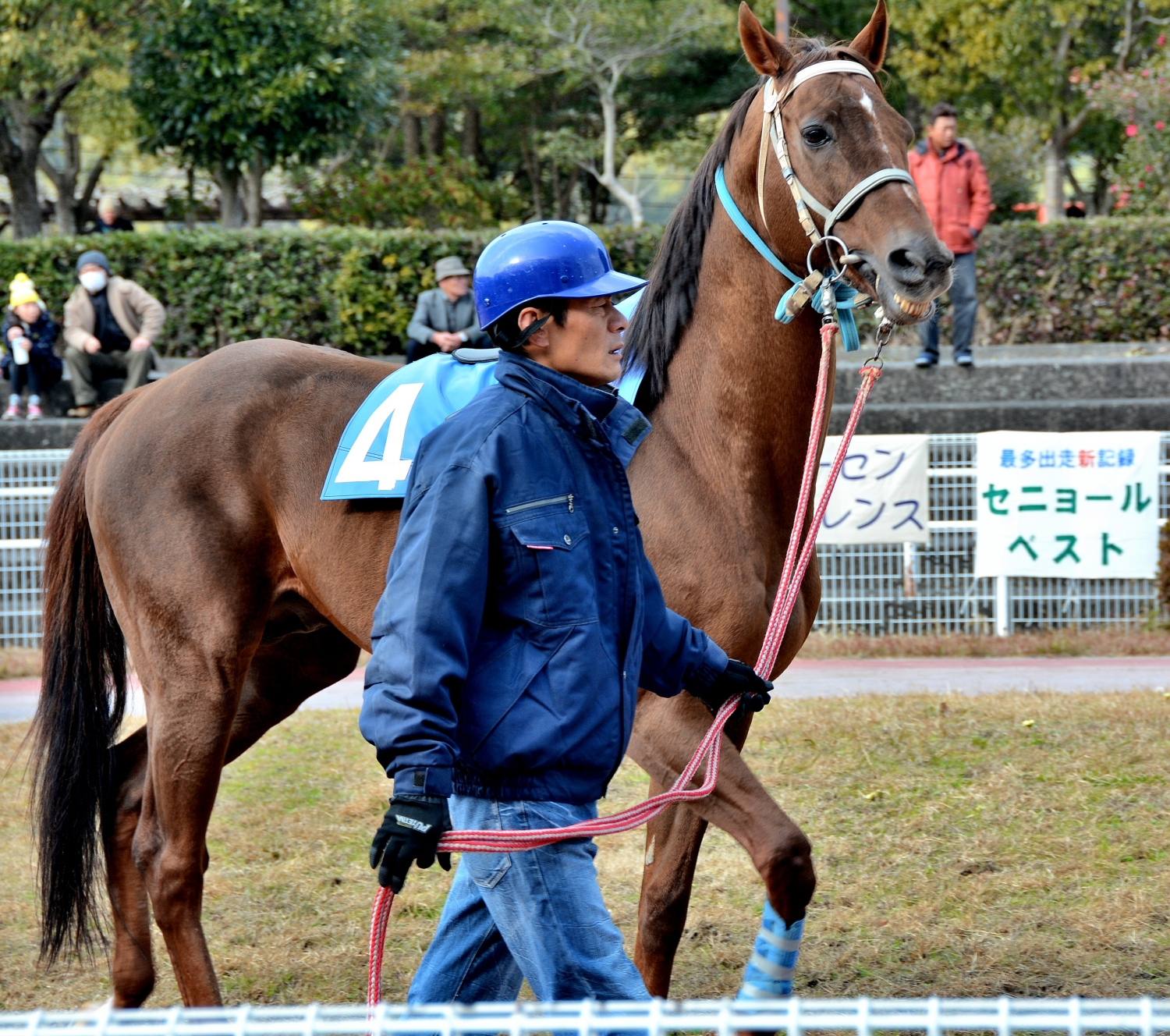 2014年1月1日（水）に高知競馬場の第1競走で、4番のセニョールベスト号がパドックで周回している所を、観客席から撮影したもの。